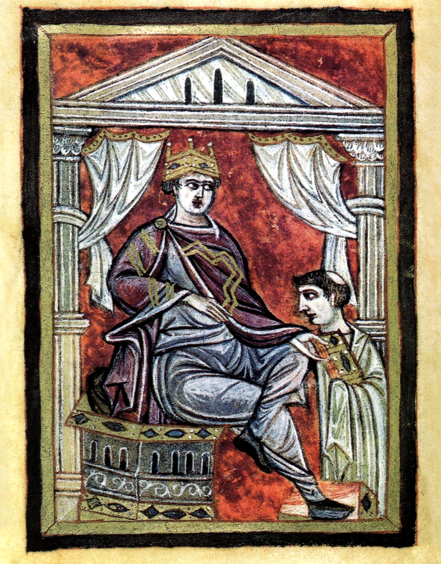 fol. 43r des Gebetsbuchs Ottos III. (Bayerische Staatsbibliothek, Clm 30111; früher Schlossbibliothek Pommersfelden): Otto nimmt das Gebetsbuch von einem kleiner dargestellten Mönch in Empfang